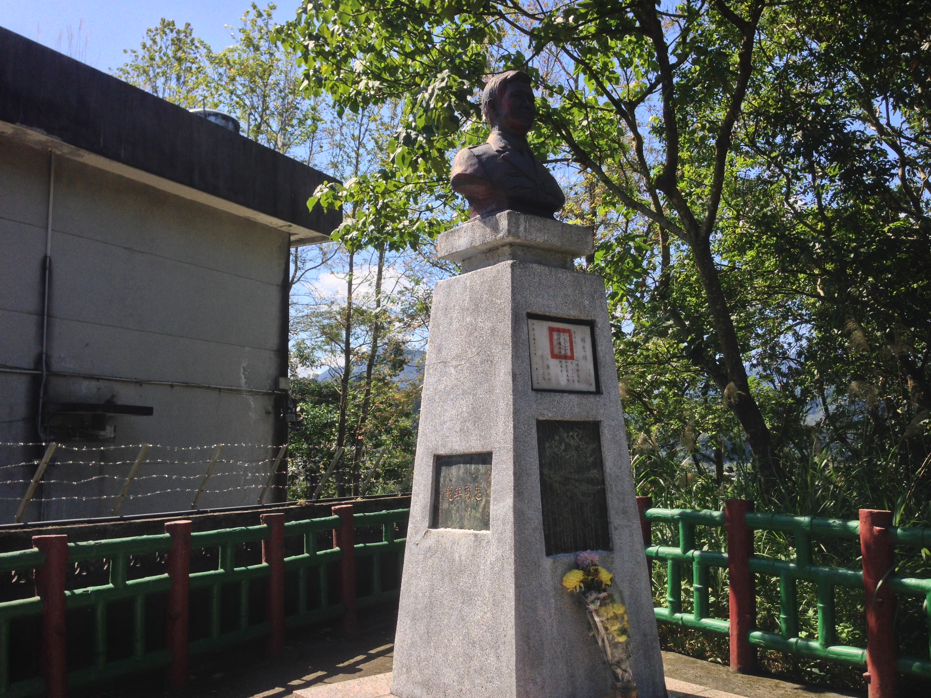 青潭堰水庫管理機關旁陳金龍銅像，正面下方刻陳金龍旌忠狀。